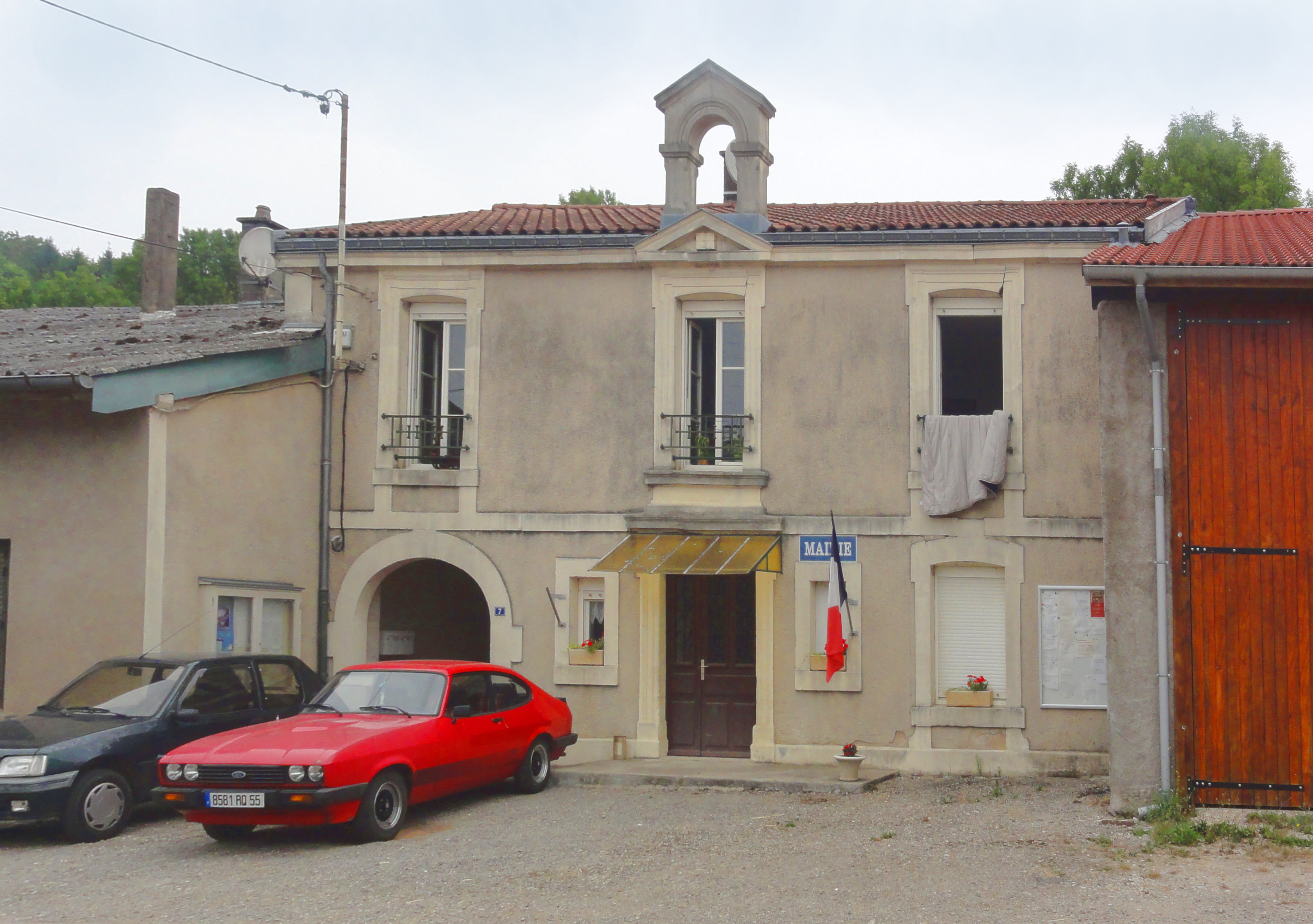 Jouy-en-Argonne (Meuse) mairie